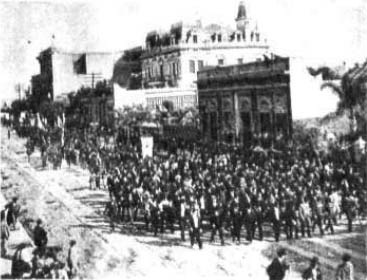 Una comitiva avanza sobre la Avenida Santa Fe, camino a Plaza Italia, para realizar el acto de colocación de la piedra fundamental donde se erigirá el Monumento a Garibaldi, en Buenos Aires, Argentina.